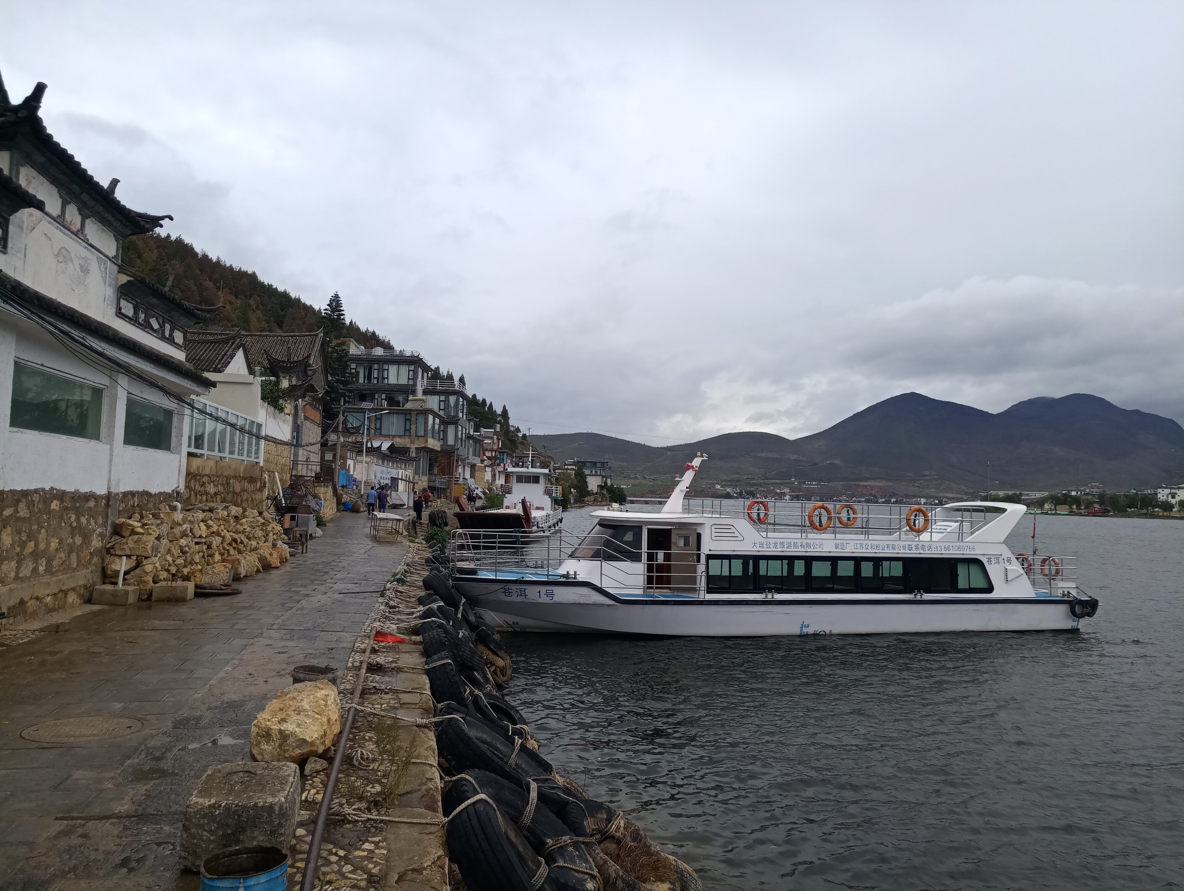 中文（中国大陆）: 金梭岛-码头